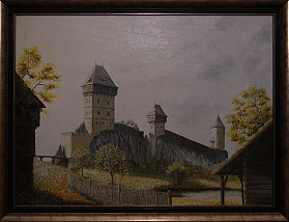 Hrad Homberk, olej na plátně 100x75 cm